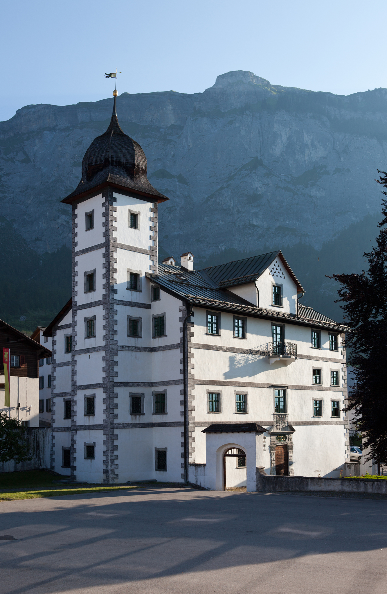 Schlössli in Flims